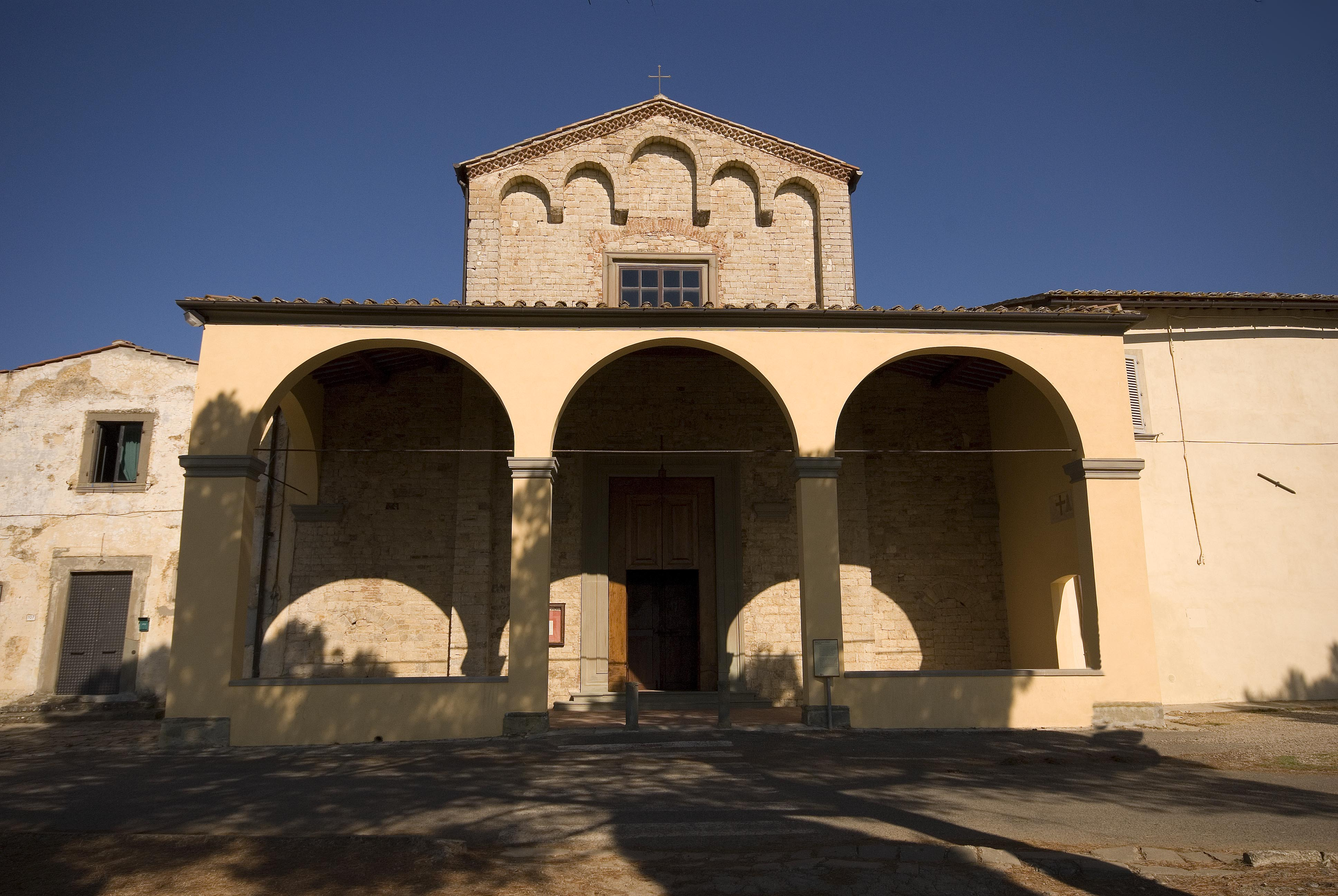 Chiesa di Campoli